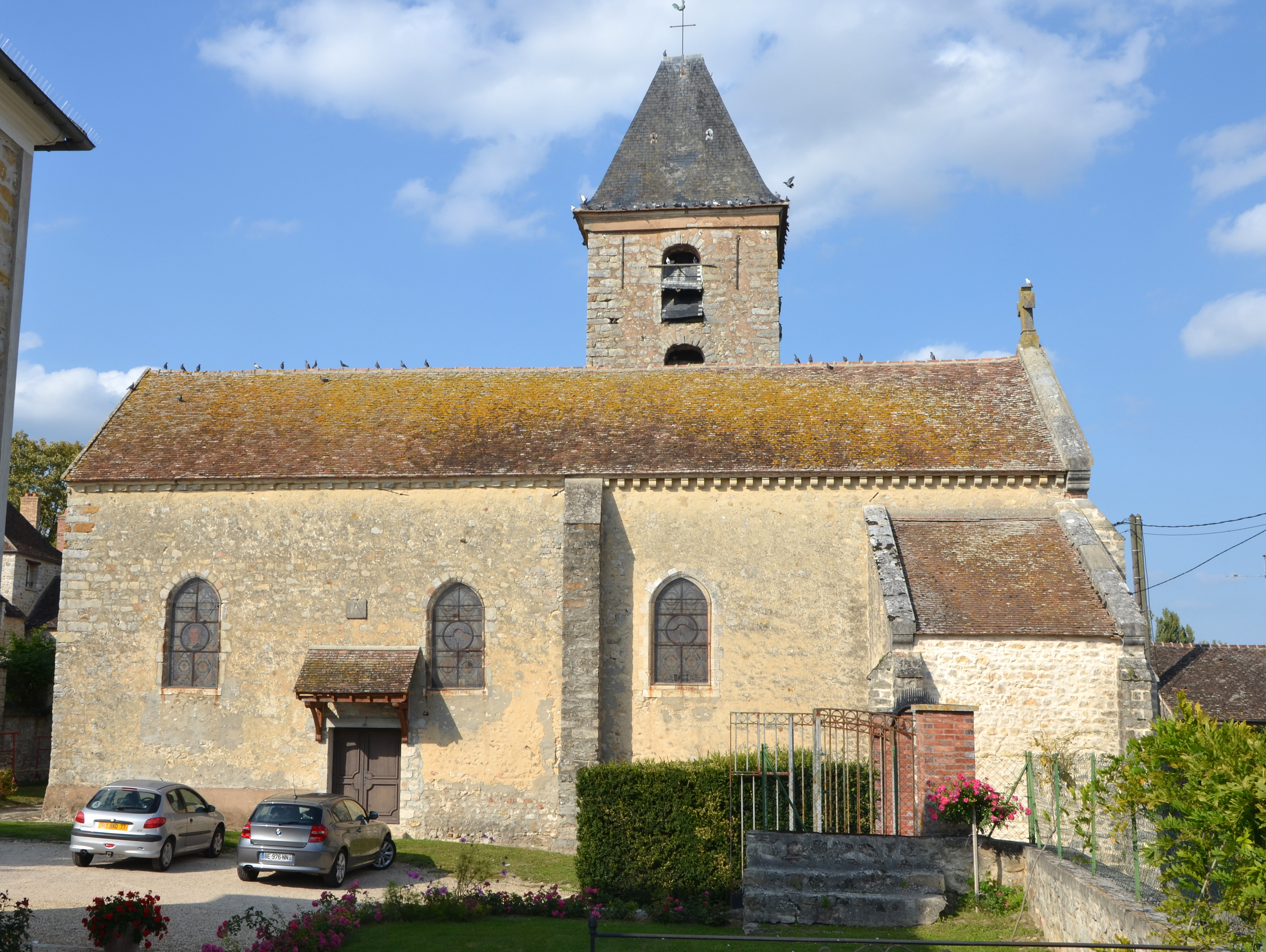 Eglise de Villecerf (Seine et Marne, France)